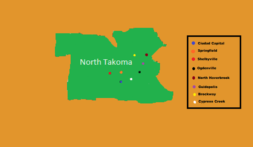 Mapa de Takoma del Norte (Actualizado)